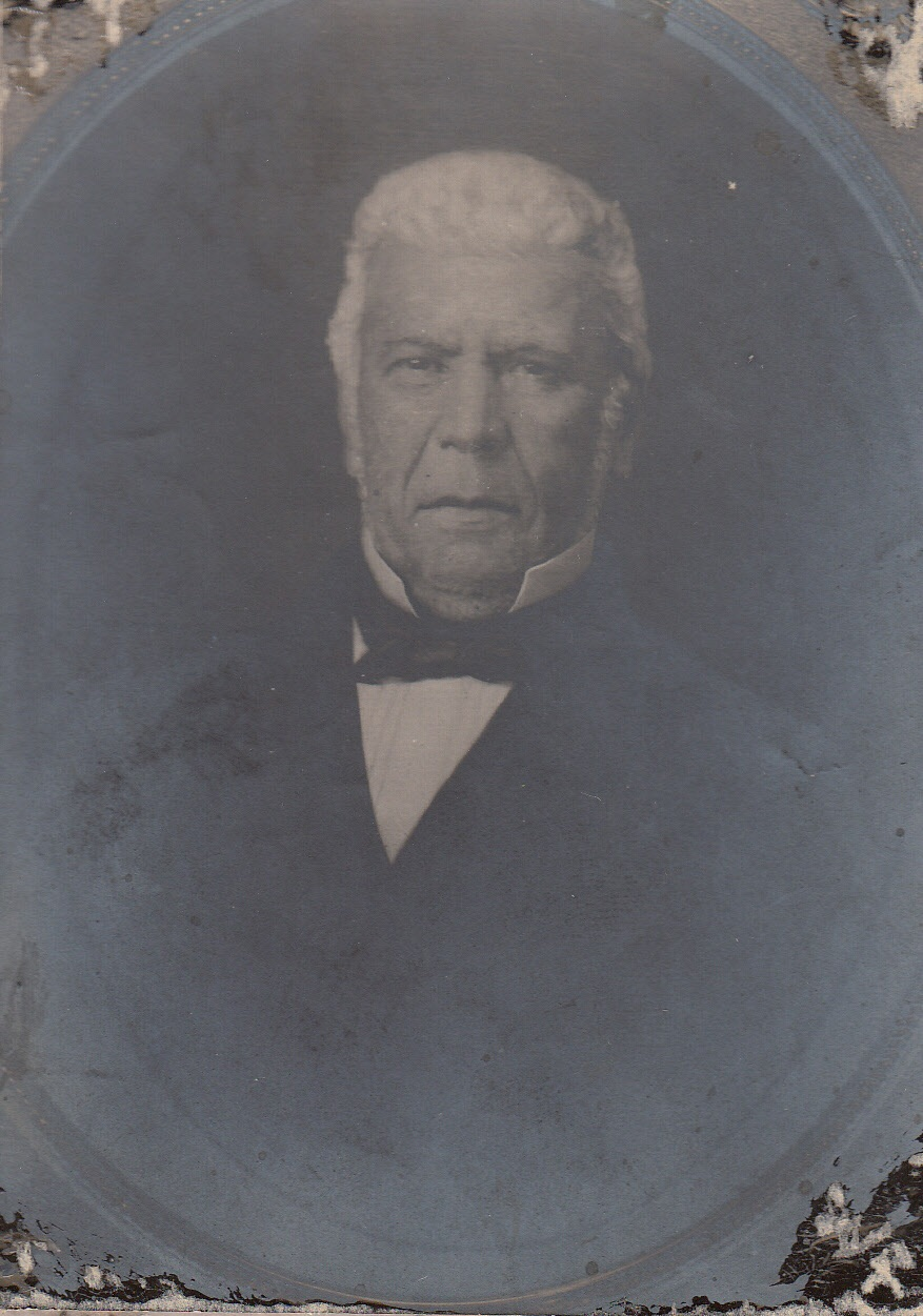 Fotografía del año de 1880 en Santiago de Chile. Esta fotografia se encuentra solamente en album familiar, debido cuando el ejercia cargos publicos como diputado y señador no se encuentra ninguna de ellas.